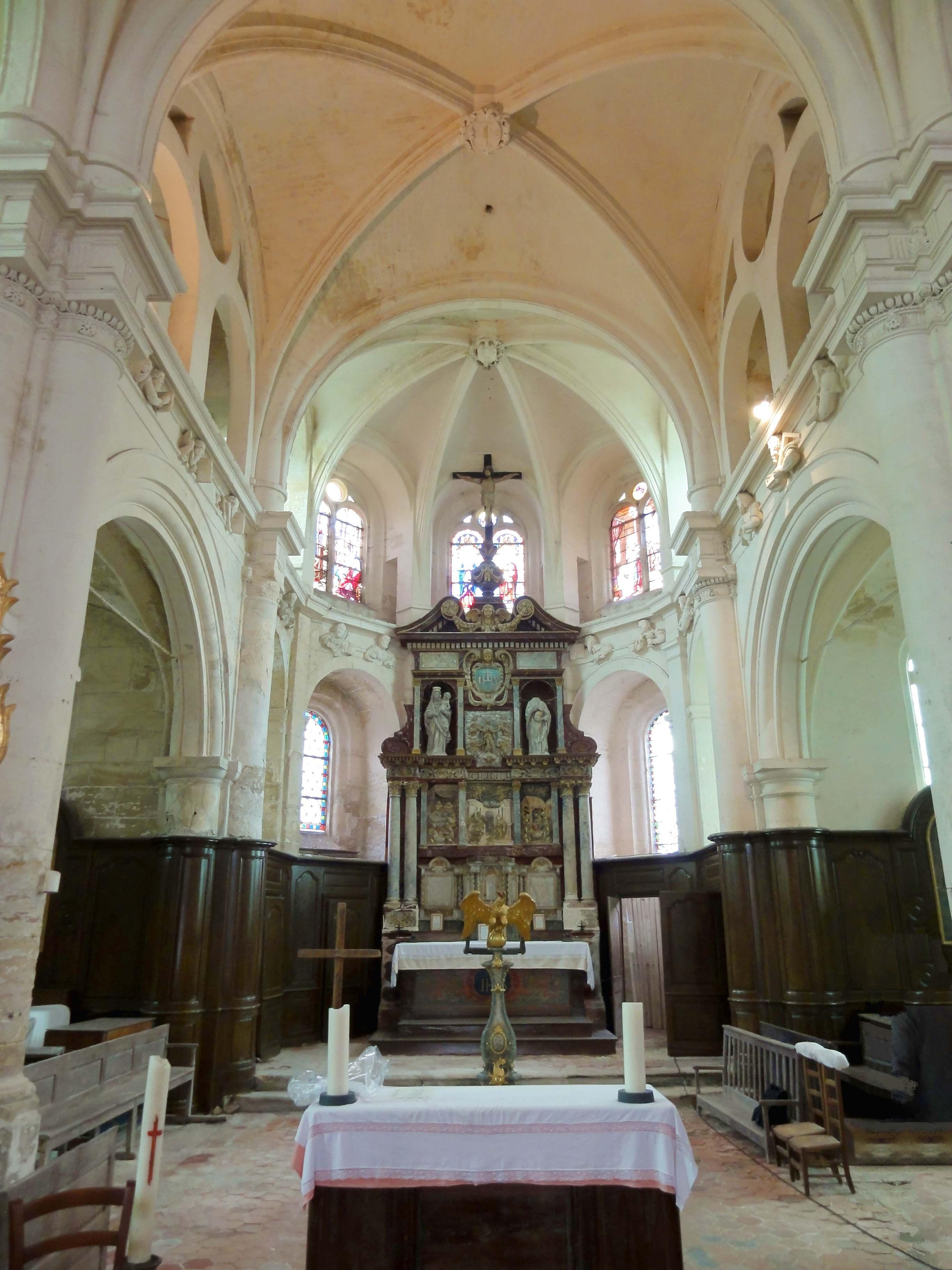 Intérieur de l'église (voir titre).